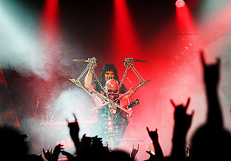 W.A.S.P. at Folken, Stavanger, 2006.